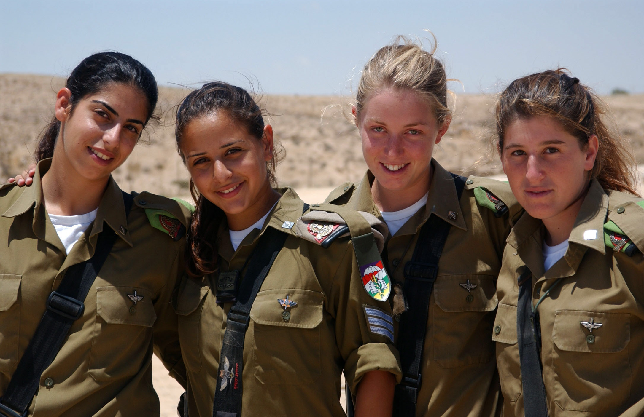 July 17, 2007. These four soldiers constitute the largest number of female soldiers ever to simultaneously complete the Sergent-First-Class' Course for the Infantry Corps. The four girls will go back to serve as commanders in their respective brigades' headquarters. ארבע חיילות אלו מהוות את מספר הבנות הגדול ביותר אשר סיימו את קורס רב-סמל בחיל הרגלי. ארבע הבנות תחזורנה לשרת במפקדות, כל אחת בחטיבה שלה.